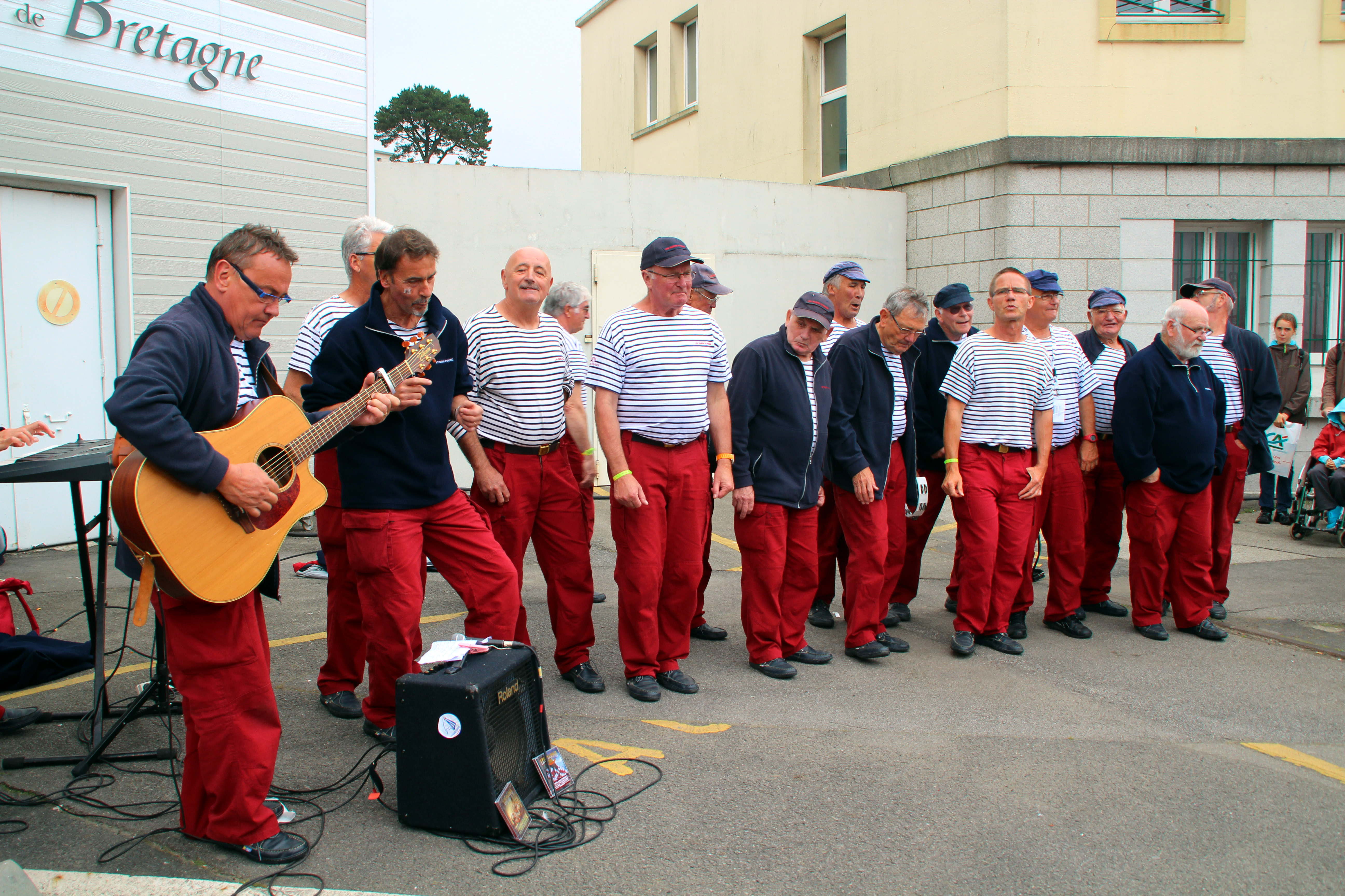 Tonnerres de Brest 2012 Les marins d'iroise